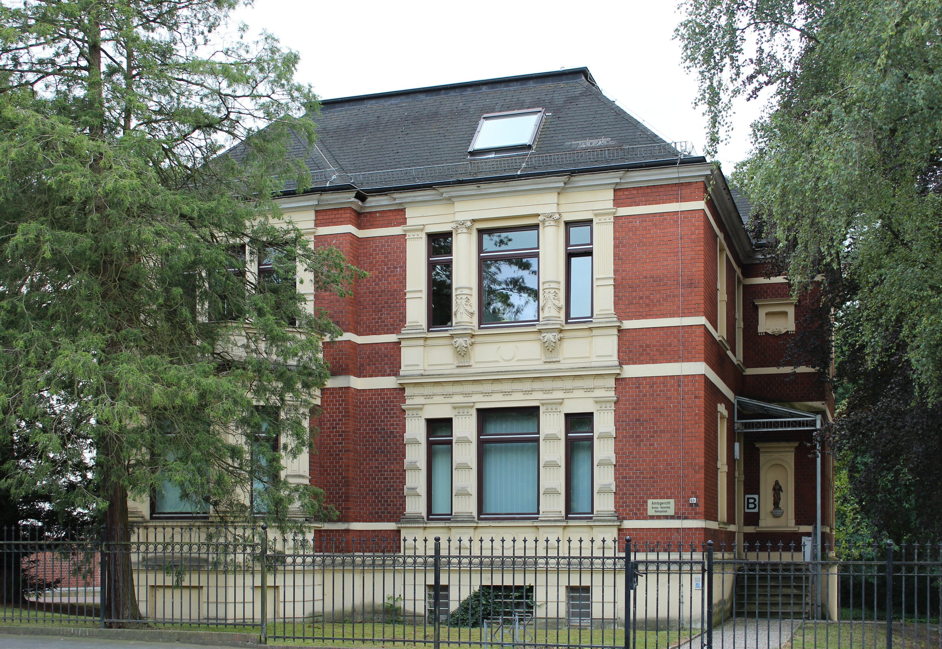 Nebengebäude B des Amtsgerichts Bremen-Blumenthal, 2011. Ehemalige Dienstvilla, Das abgebildete Objekt ist ein geschütztes Kulturdenkmal in der Freien Hansestadt Bremen, mit der Nr. 3417 beim Landesamt für Denkmalpflege registriert.